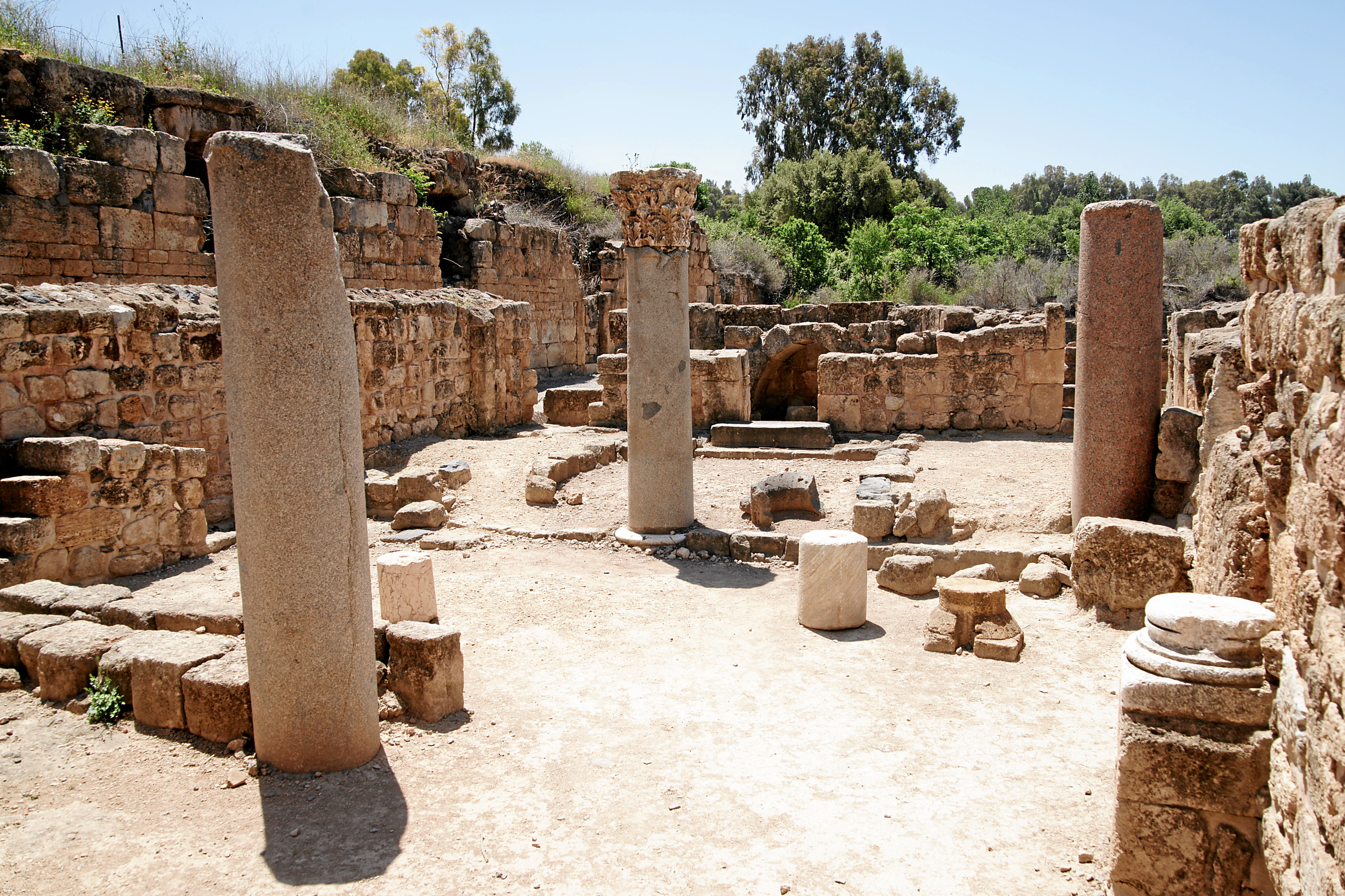 Caesarea Philippi: Ruinen der Synagoge